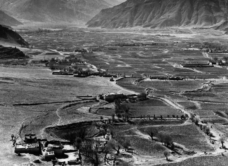 Hampulakang, Blick auf die fruchtbare Jalung [Yalung]-Ebene von einer Anhöhe aus